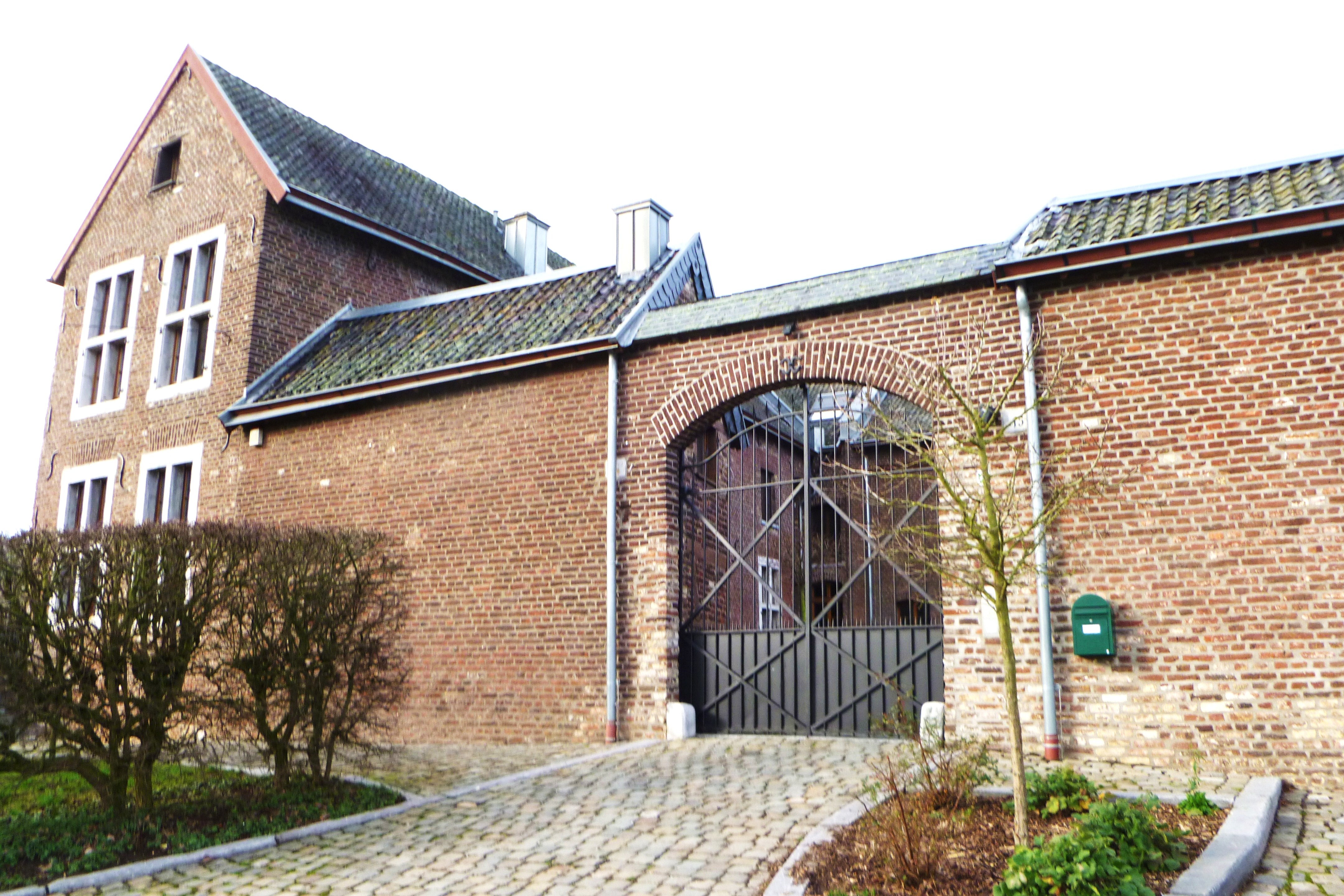 Baudenkmal in Aachen-Mitte - Am Hasselholz - Haus Nummer 15!